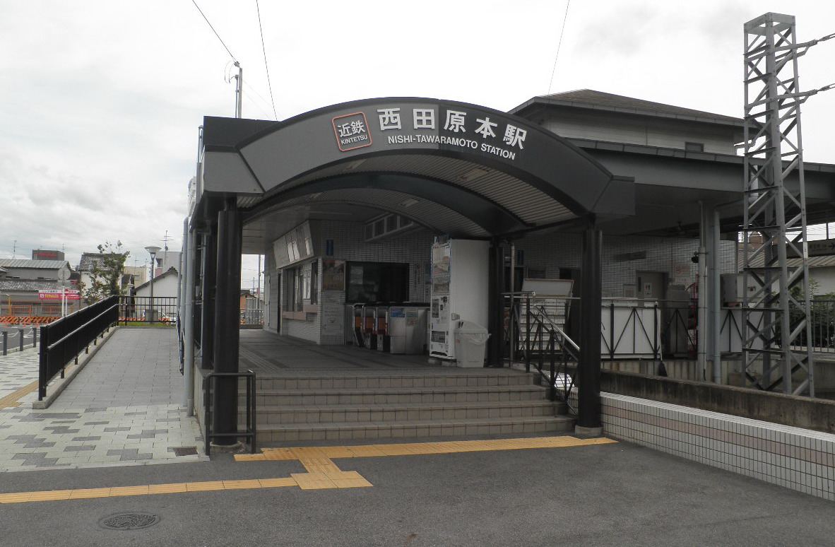 近鉄西田原本駅